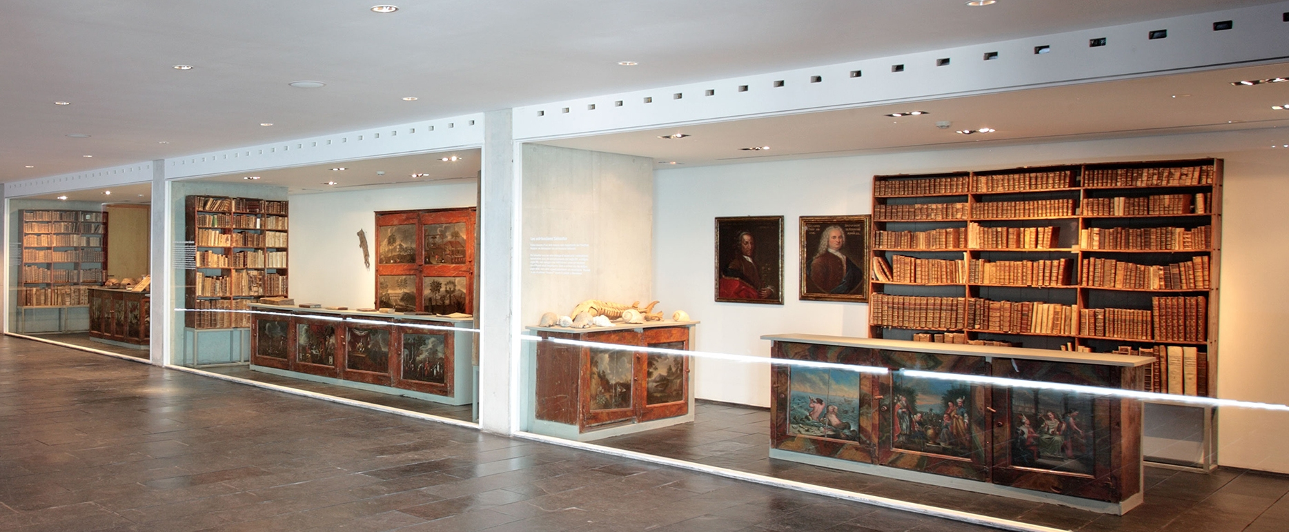 Gabinet Salvador à l'Institut Botánic de Barcelona